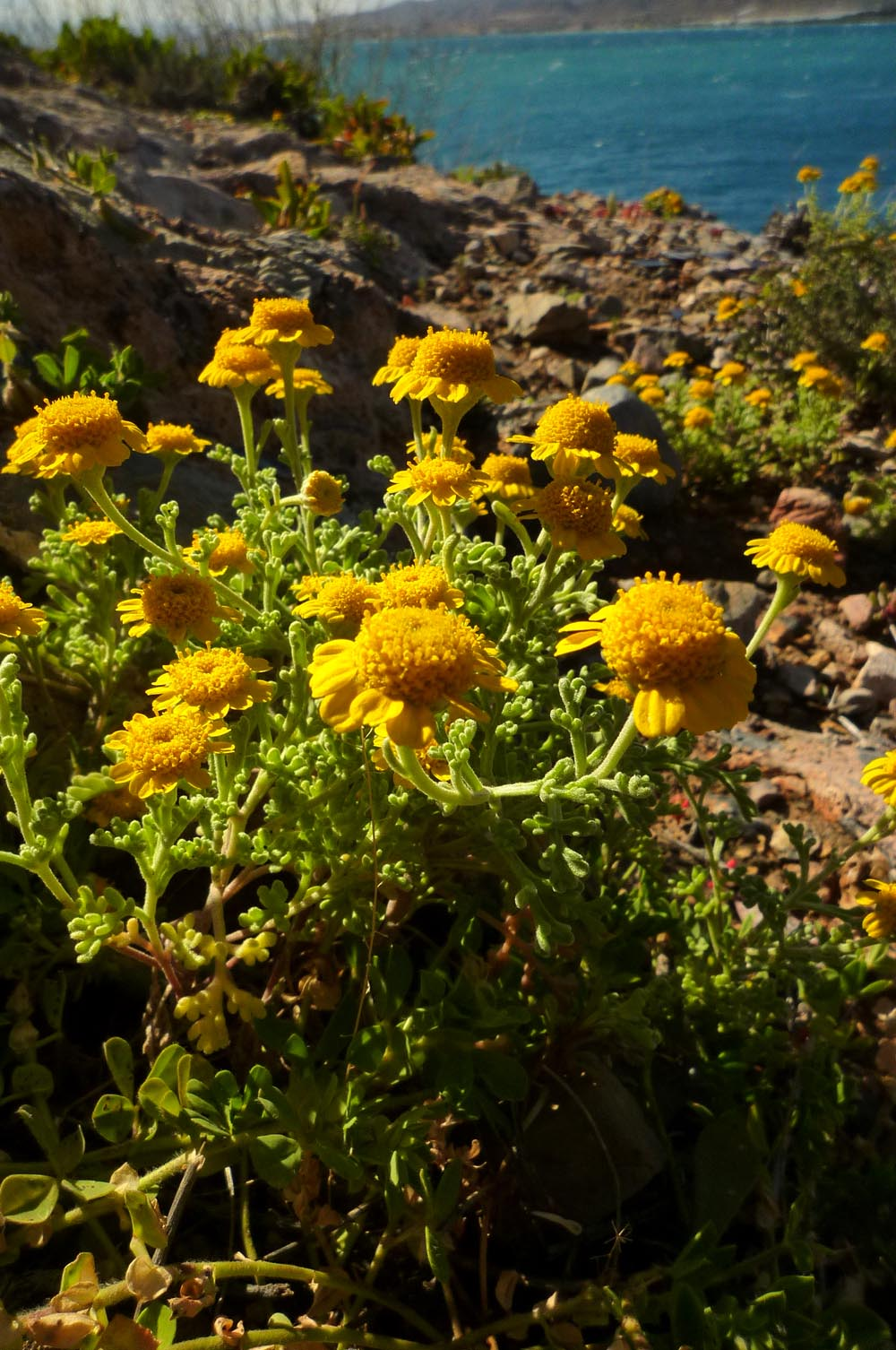 Anthemis chrysantha (Manzanilla de Escombreras), endemismo iberoafricano, en la punta de La Azohía, Cartagena, España.